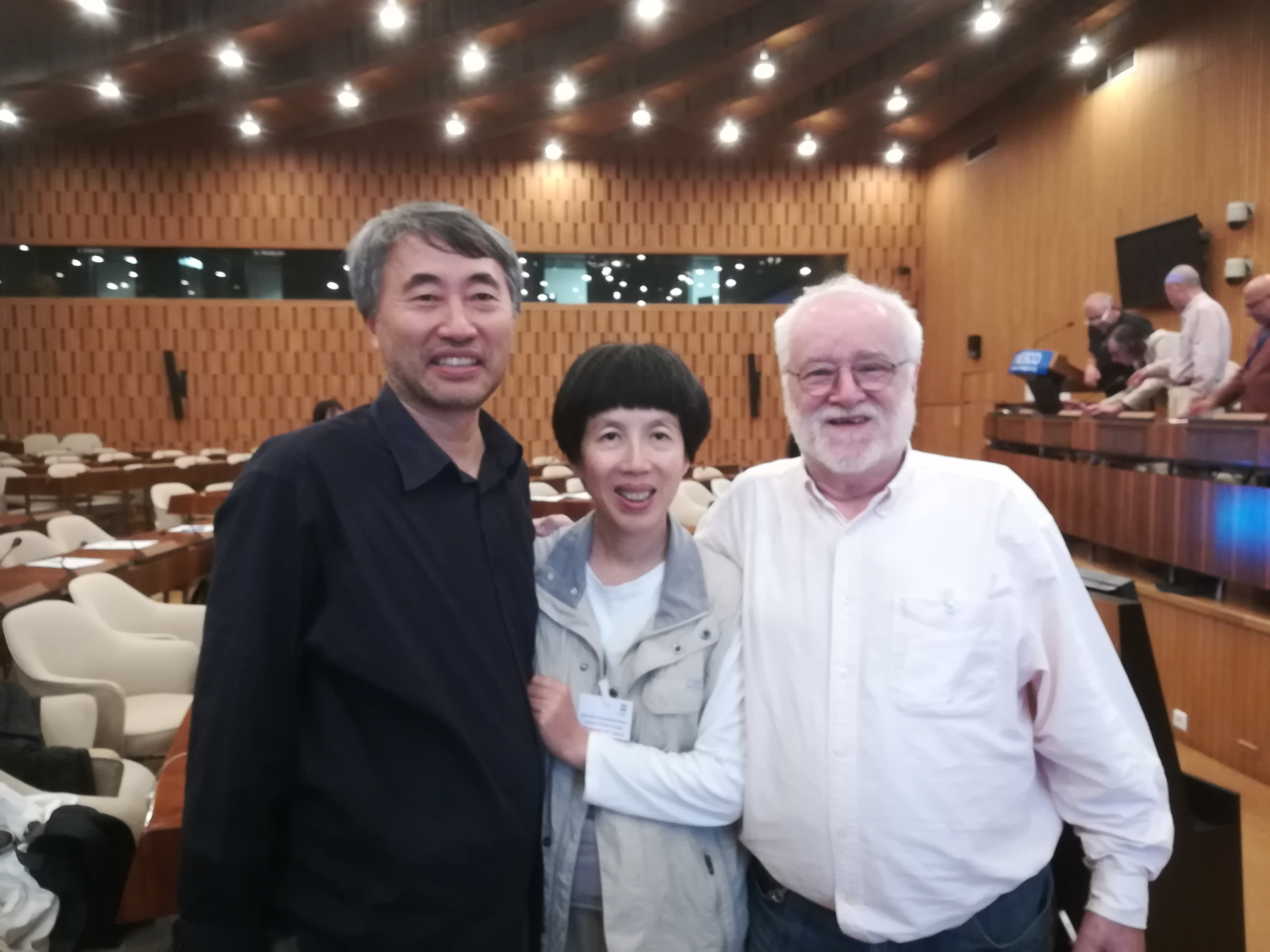 Sportive du jeu de go du niveau le plus élevé du monde